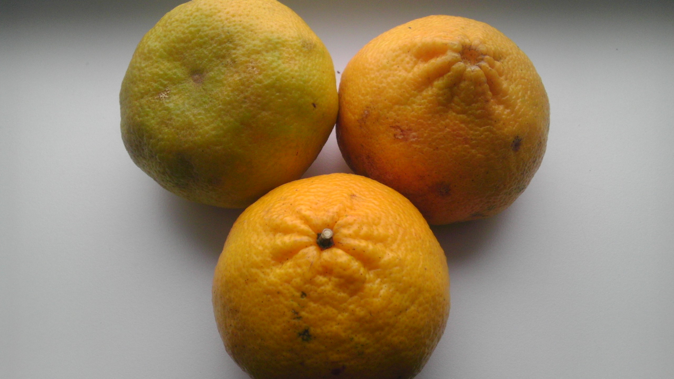 Uglid